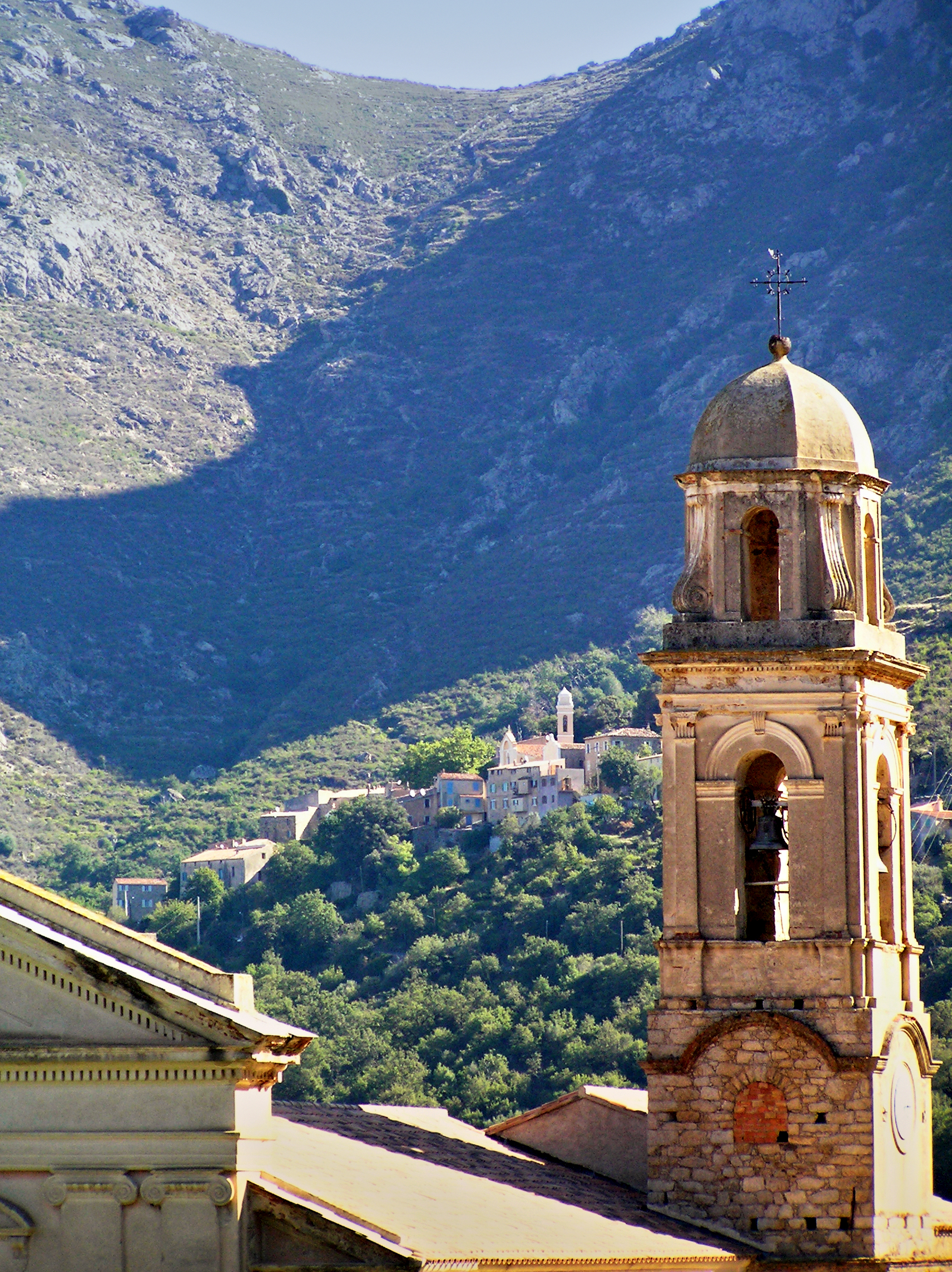 Nessa (Corsica) - Vue du village depuis Feliceto (clocher de l'église Saint-Nicolas)